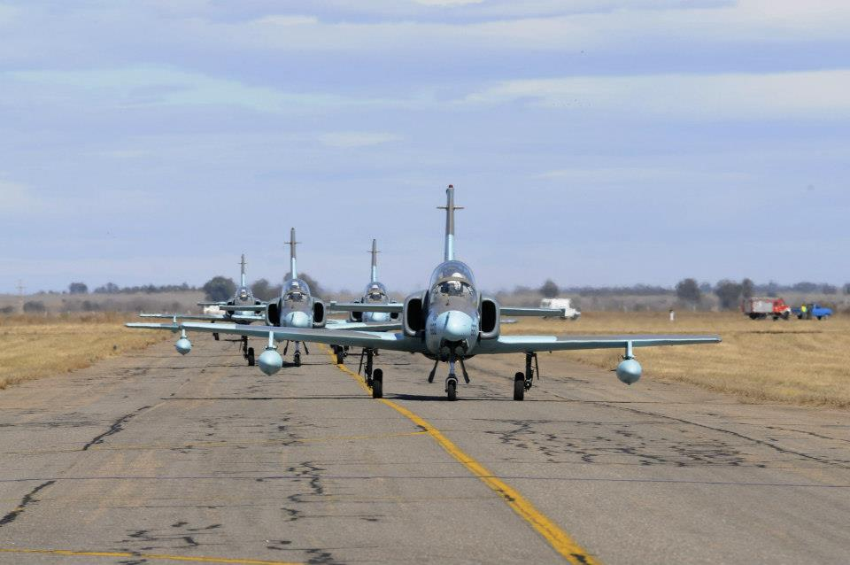 k-8 bolivianos despegando en una pista de aterrizaje